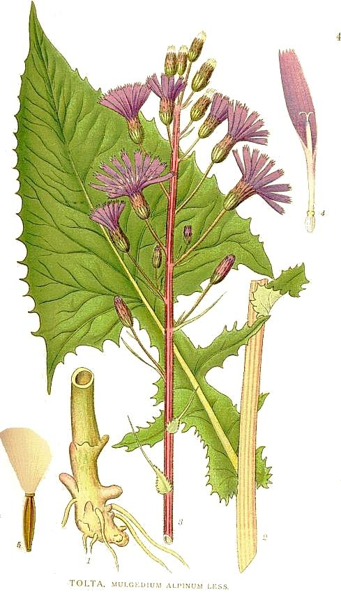 Cicerbita alpina (L.) Wallr., syn. Mulgedium alpinum (L.) Less. Original Description Torta, Mulgedium alpinum Less.